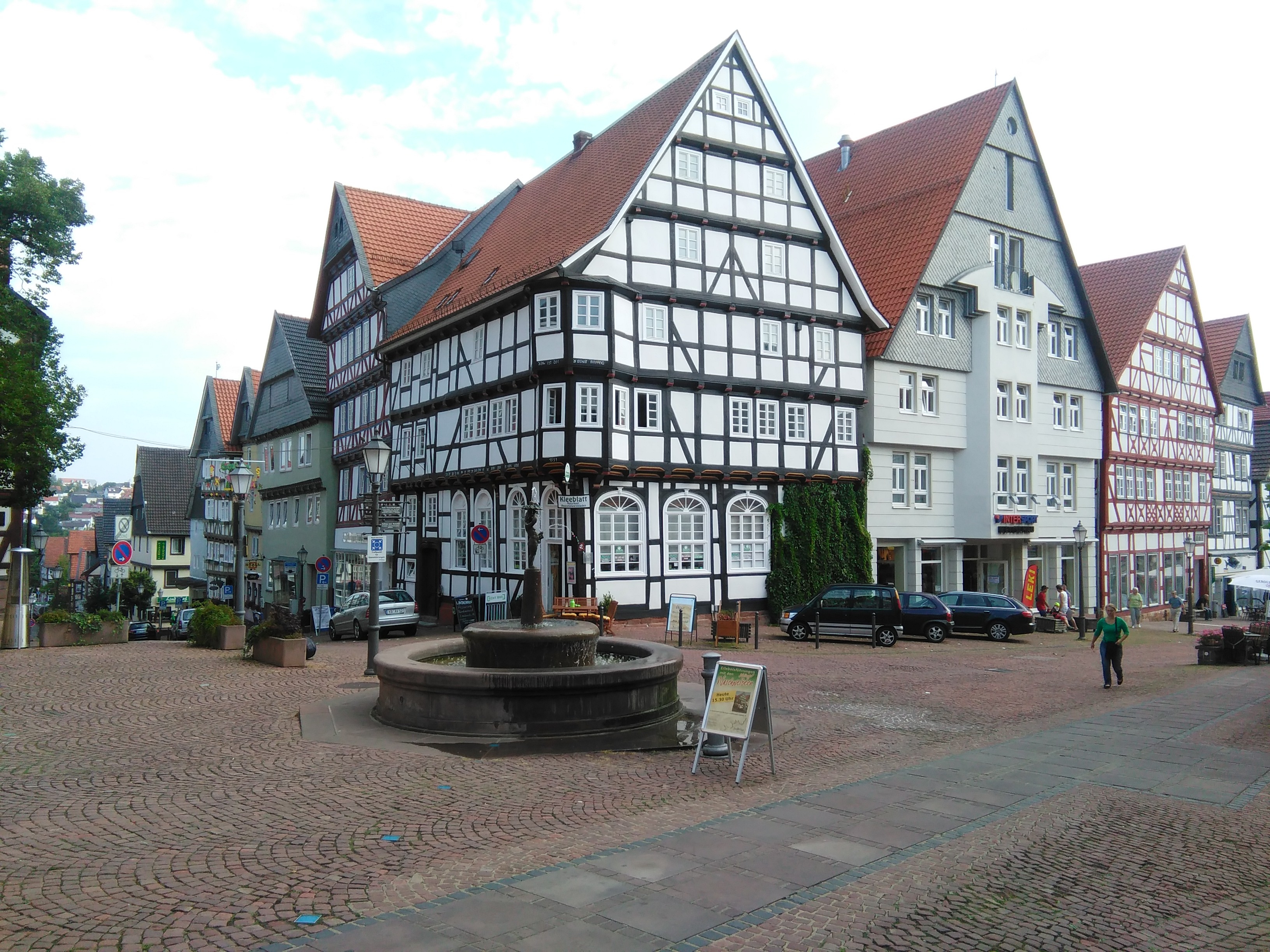 zicht op de Altstadt Bad Wildungen